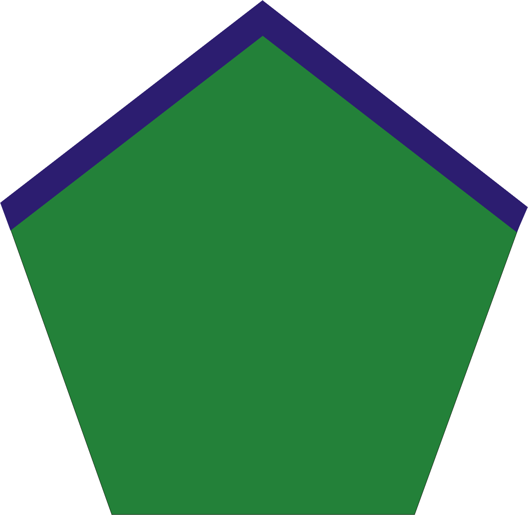 Patka artylerii lekkiej (na kołnierz) wprowadzona w Wojsku Polskim w Anglii w 1941